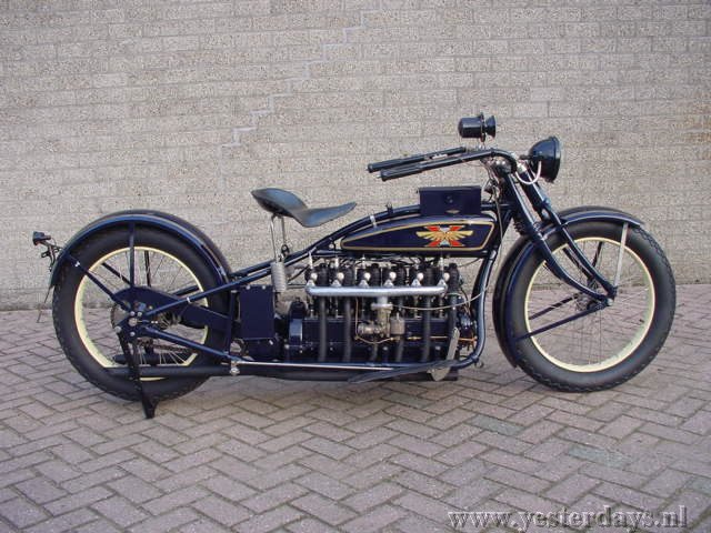 Toestemming van Yesterdays Antique Motorcycles ( Categorie:Afbeelding motorfiets